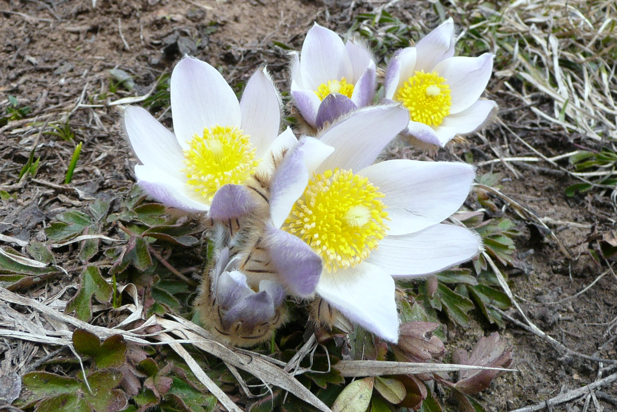 Pulsatilla Vernalis fr: noms vulgaires Anémone de printemps, Pulsatille de printemps; lieu=Photo prise le 11 mai à environ 1900 mètres d'altitude sur un alpage situé sur l'adret au dessus de Champagny-en-Vanoise (Alpes du Nord, France) alors que la limite de l'enneigement était à 2000 mètres